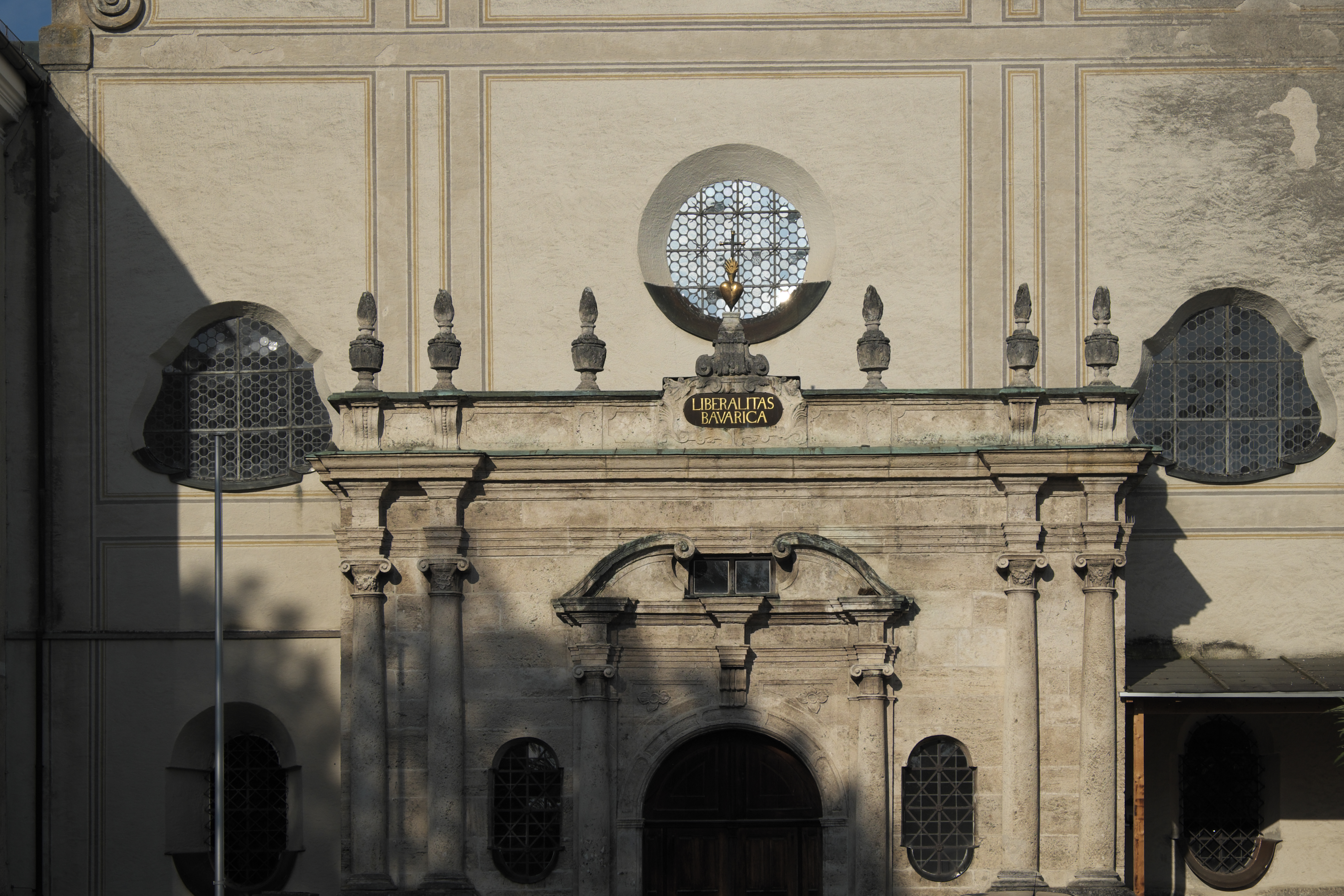 Kirche Heilig Kreuz des ehemaligen Augustinerchorherrenstifts in Polling im Landkreis Weilheim-Schongau (Bayern/Deutschland), Vorhalle mit Inschrift „LIBERALITAS BAVARICA“